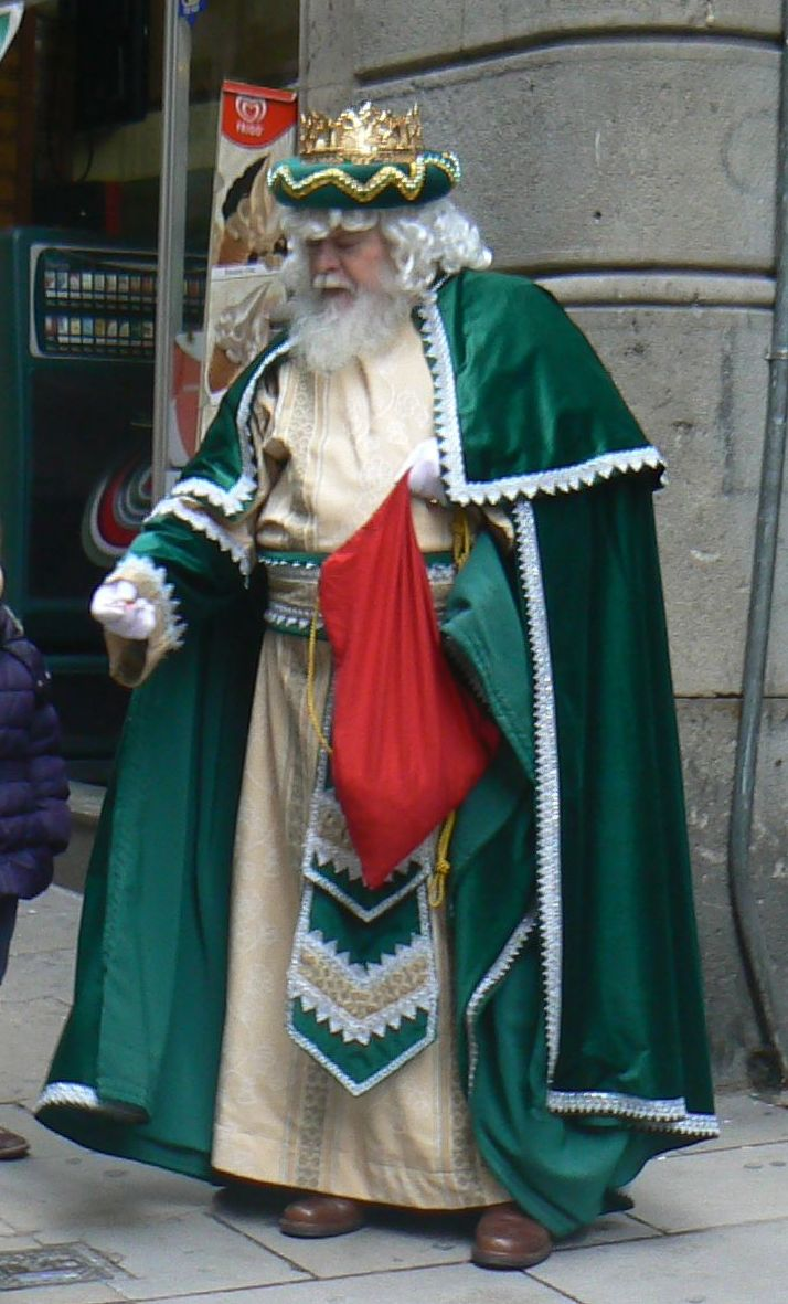 El rei Melxor fent turisme pel barri gòtic de Barcelona.